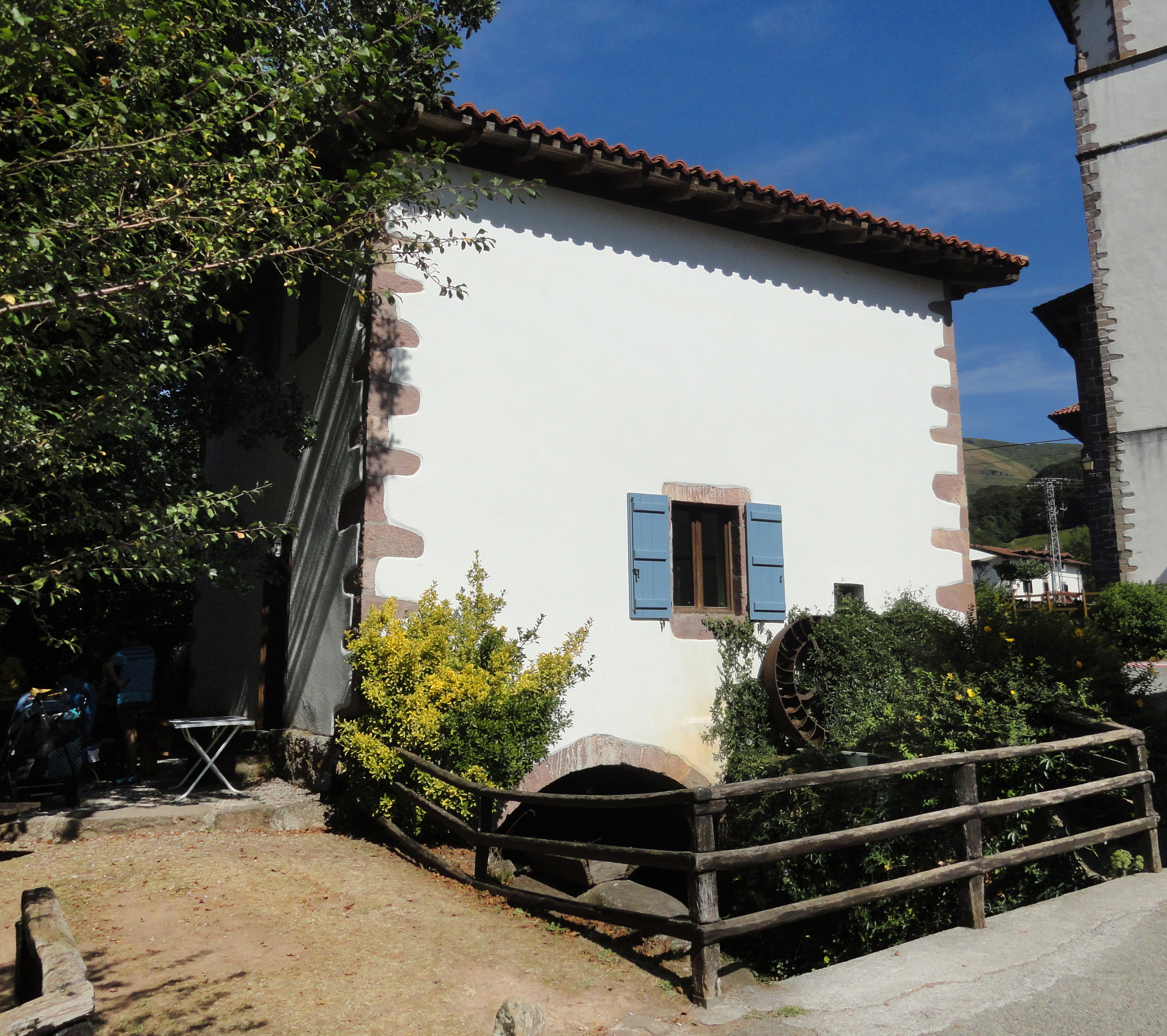 Amaiurko errota